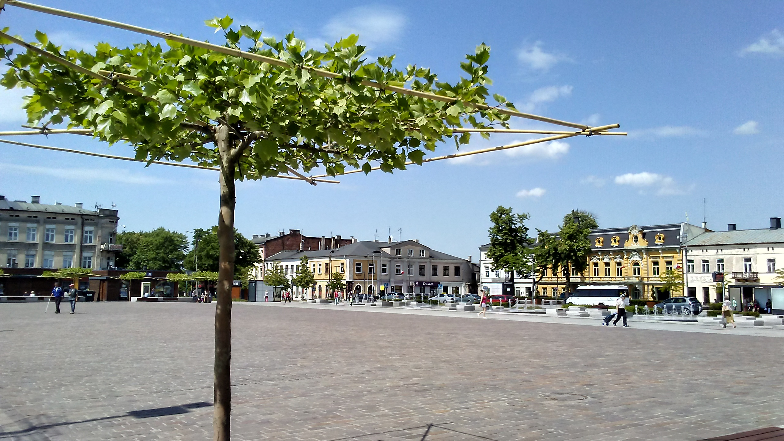 Plac Kościuszki w Tomaszowie Mazowieckim główny plac w mieście